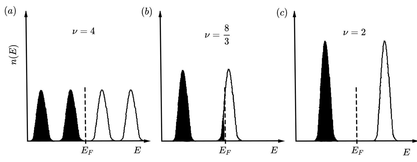 Niveles de Landau sin considerar spin splitting